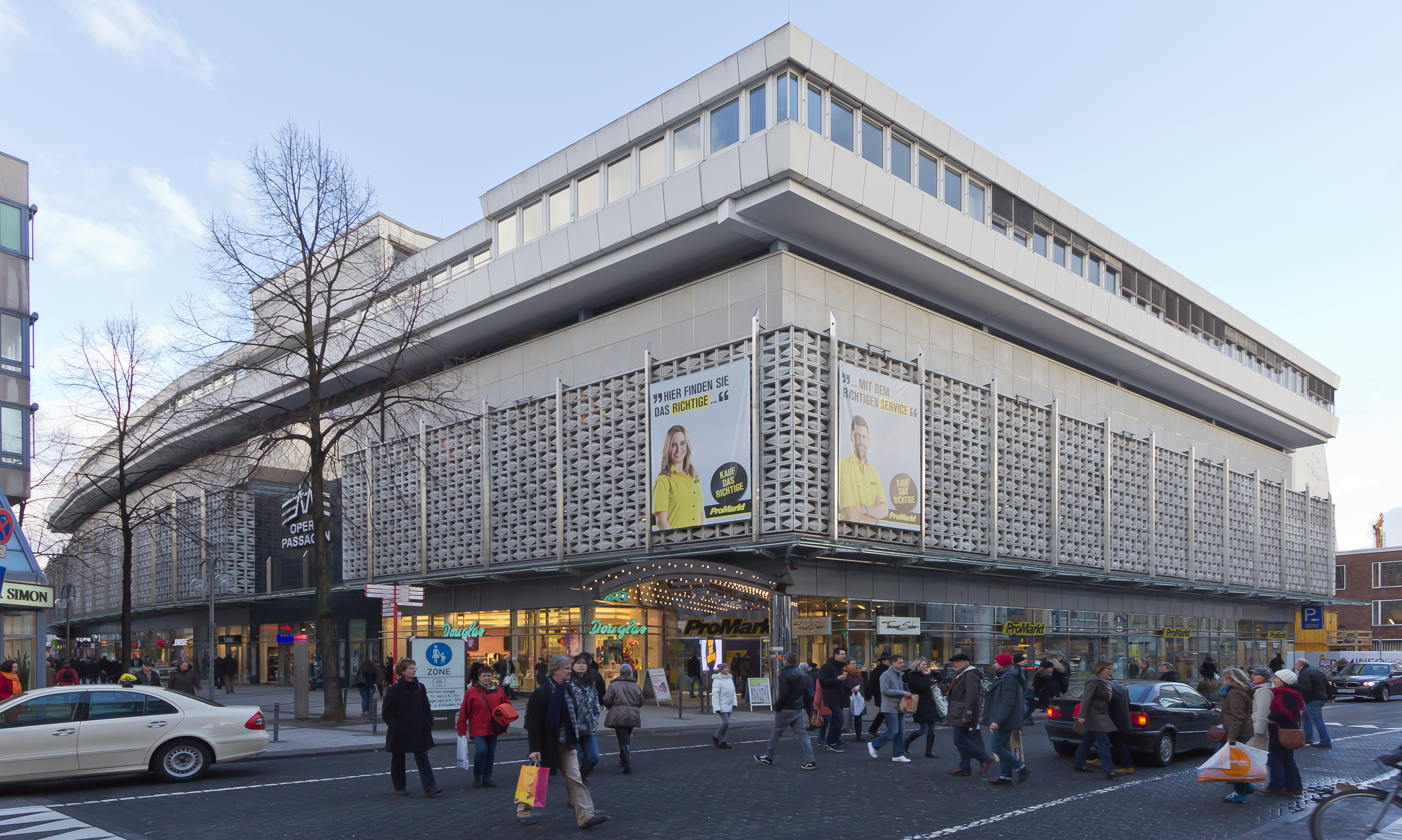 Opern Passagen Köln, Ansicht von Nordwesten, Kreuzung Breite Straße/Neue Langgasse